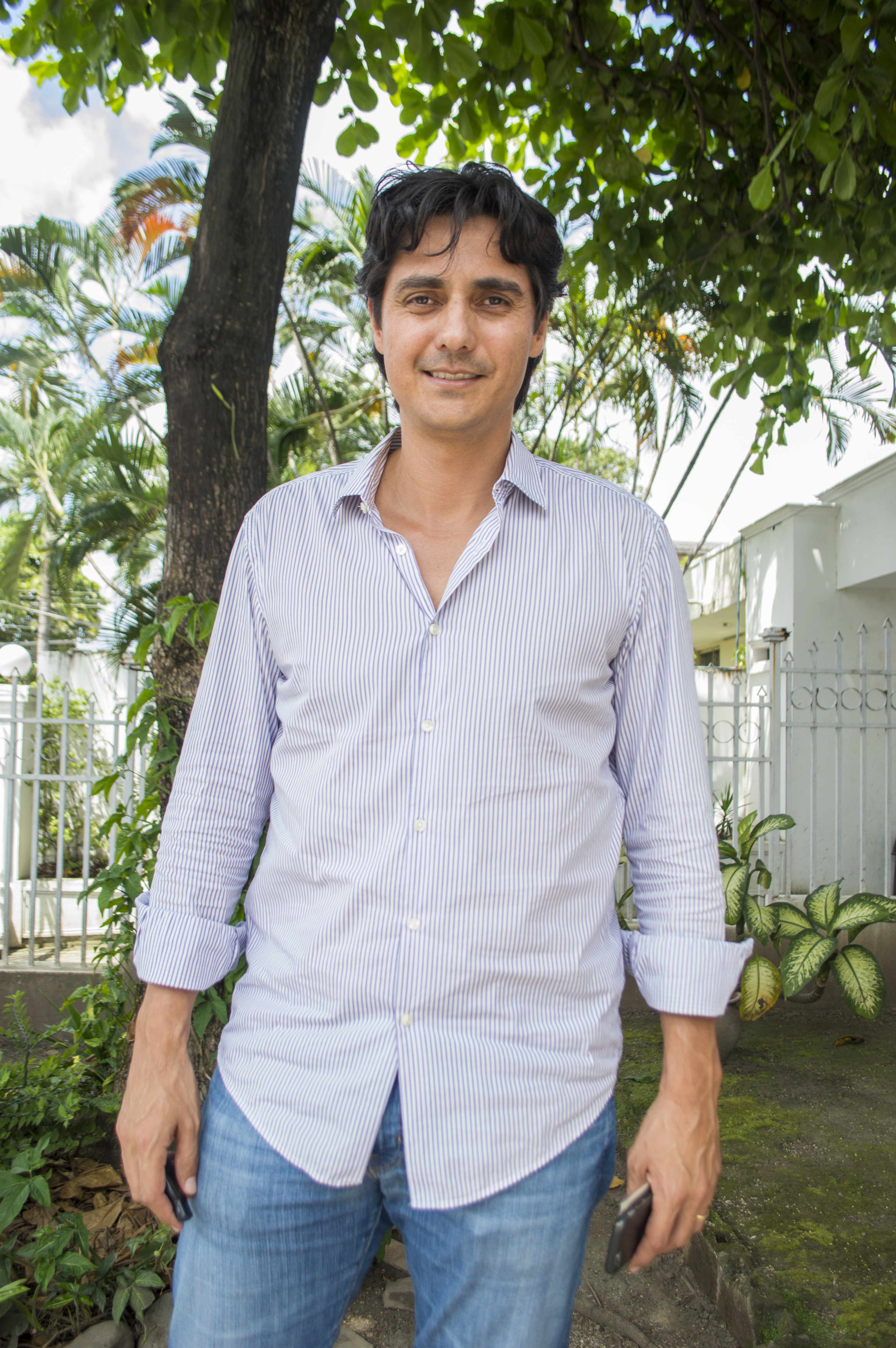 Nicolás Lapentti, ex tenista ecuatoriano, en 2017